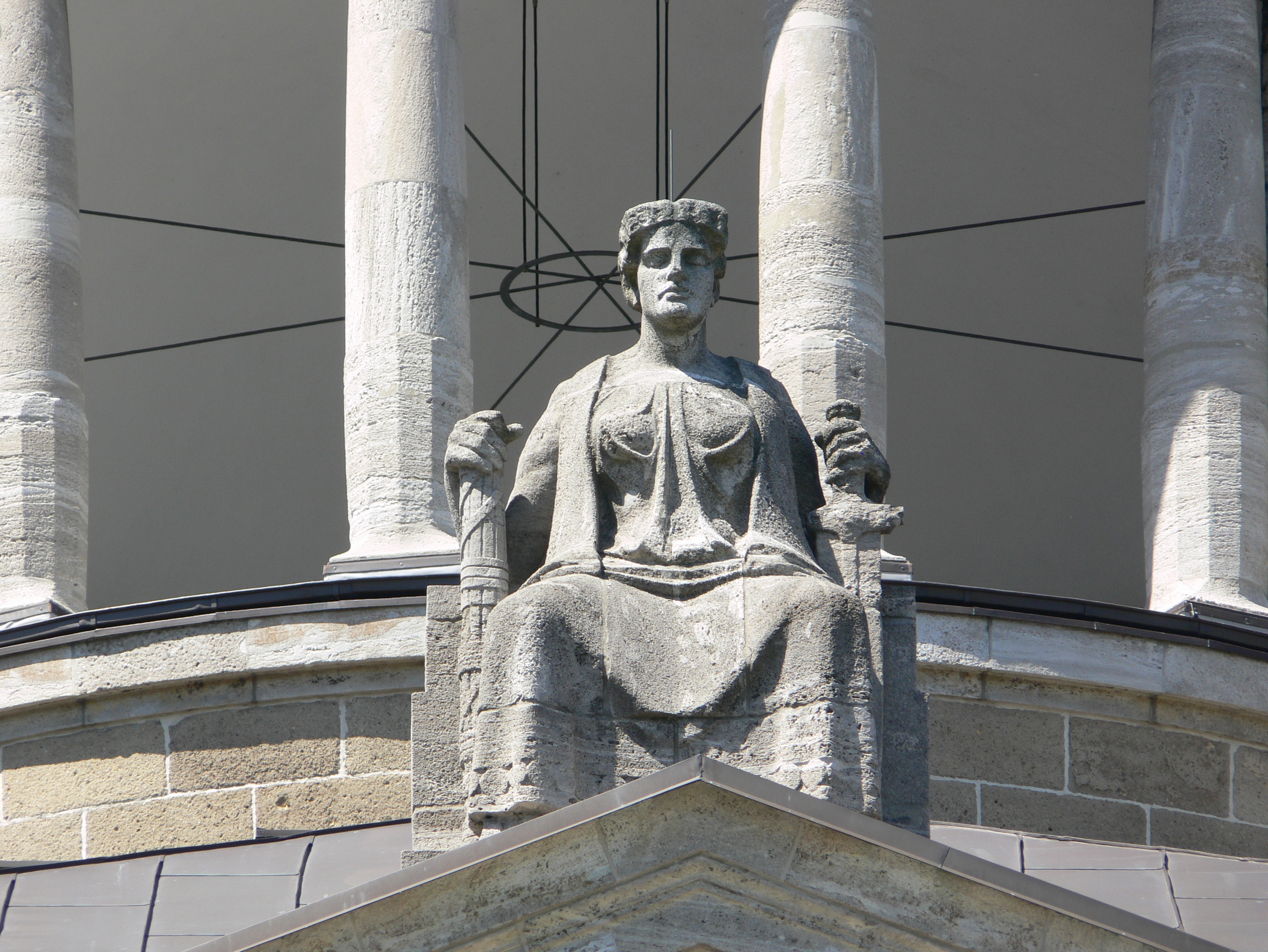 Hamburg, Hanseatisches Oberlandesgericht, Skulptur der Justitia von Arthur Bock (Justitia stützt ihre Arme auf ein Rutenbündel und das gesenkte Schwert)